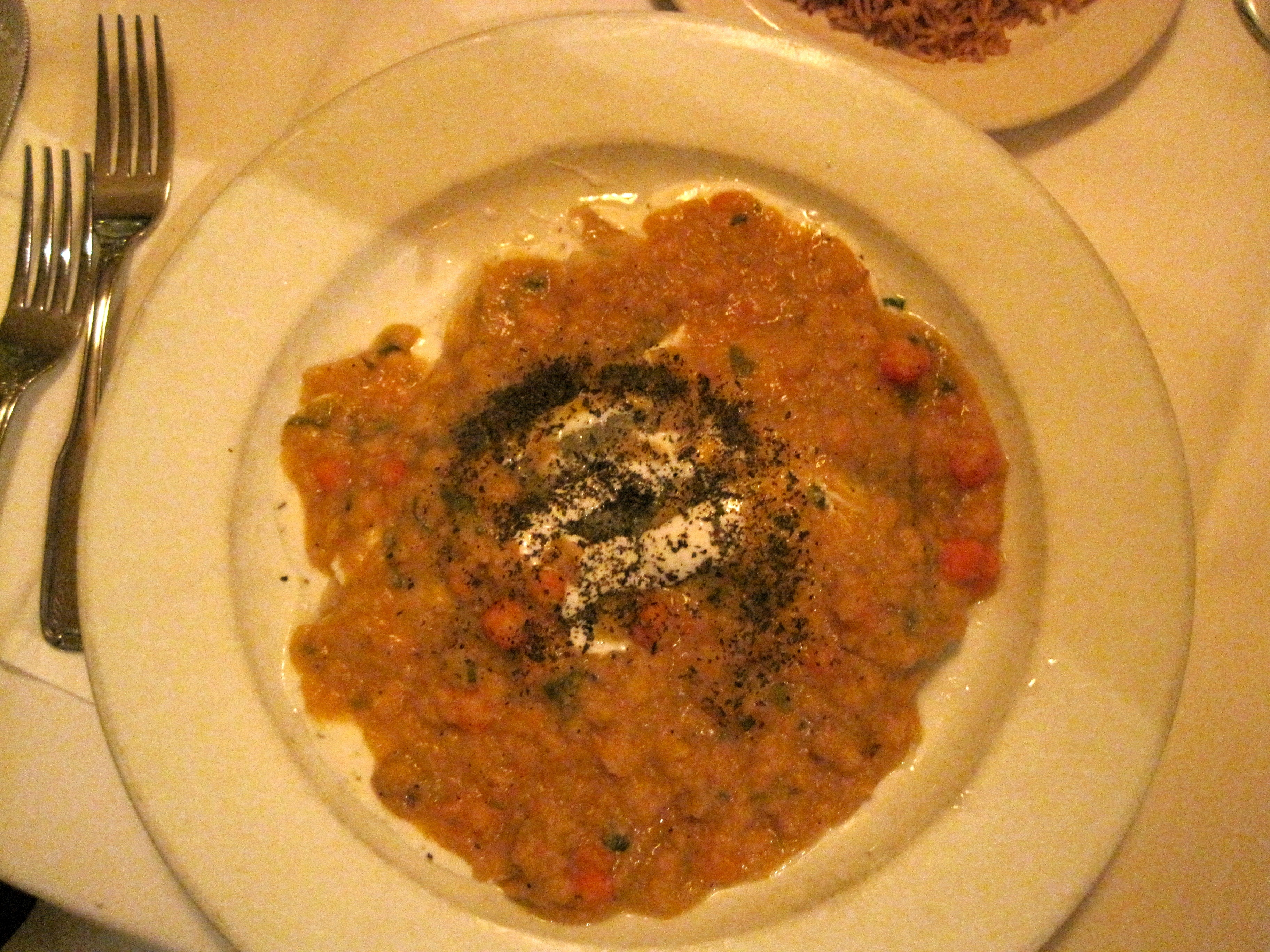 Ashak